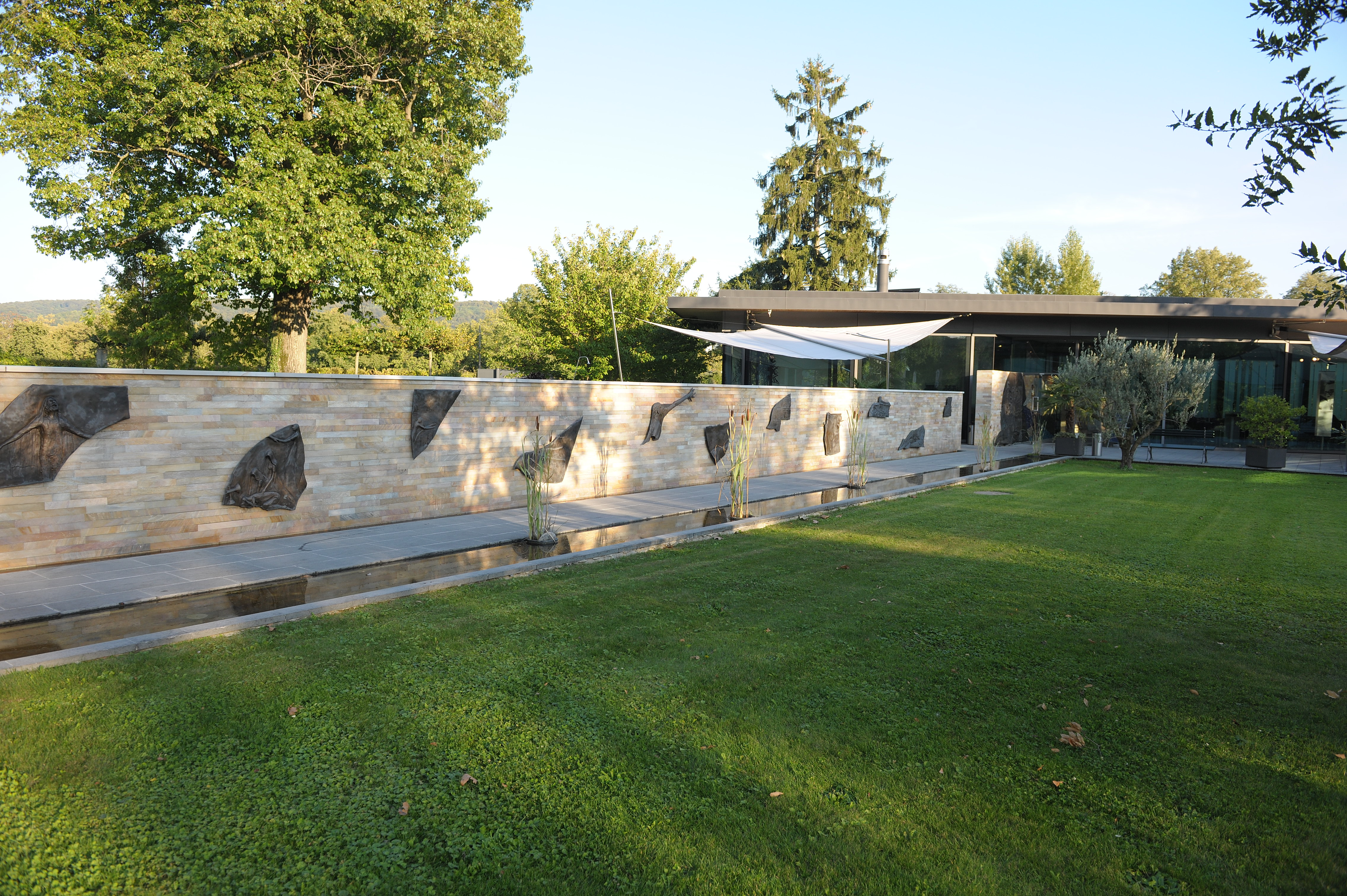 An der Steinmauer, die zum Hirzen Pavillon auf dem Bäumlihofgut in Riehen (Schweiz) führt, sind zwölf Bronzerelief-Fragmente angebracht; ein Teil des dreiteiligen „Esther-Reliefs“ des Künstlers Rick Wienecke.